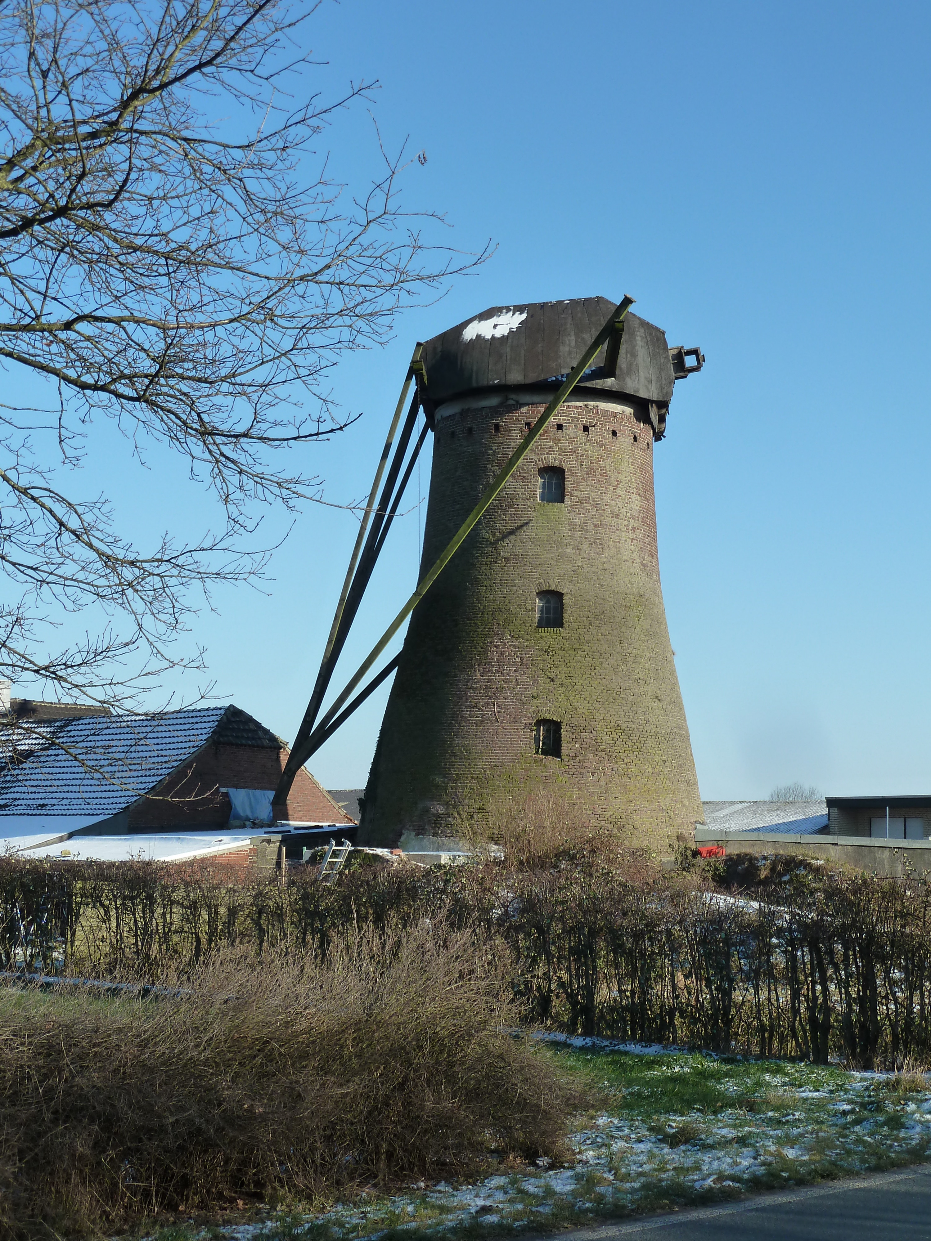 Alte Windmühle in Twisteden – Am Scheidweg